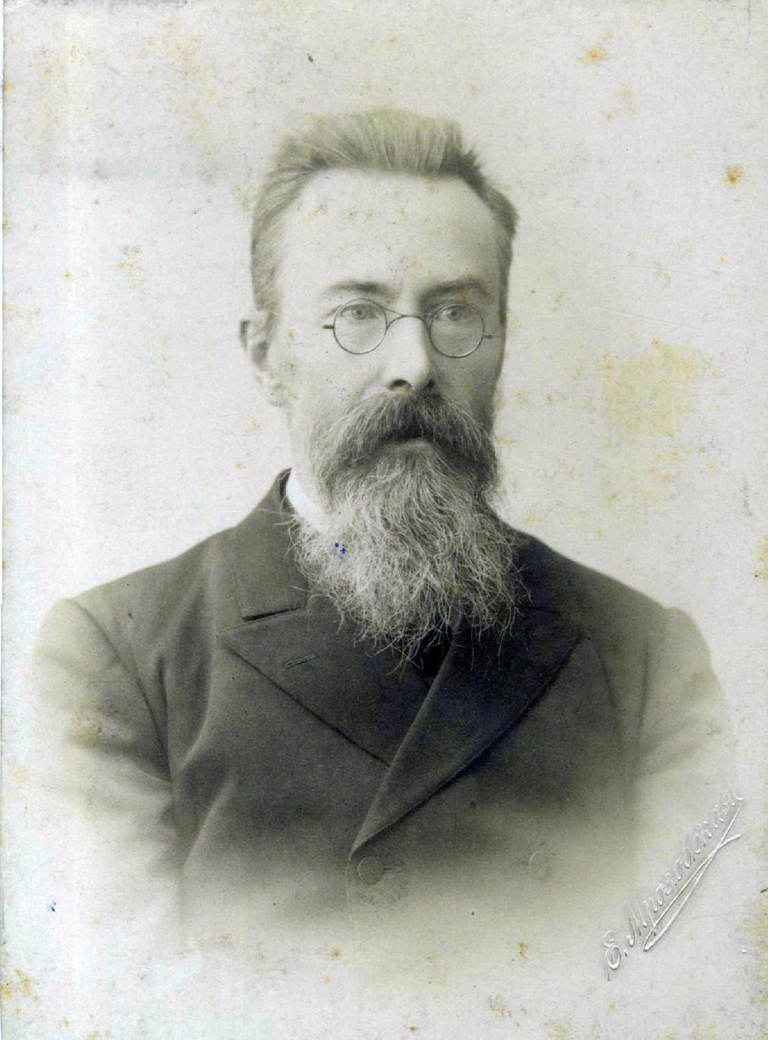 Римский-Корсаков, Николай Андреевич